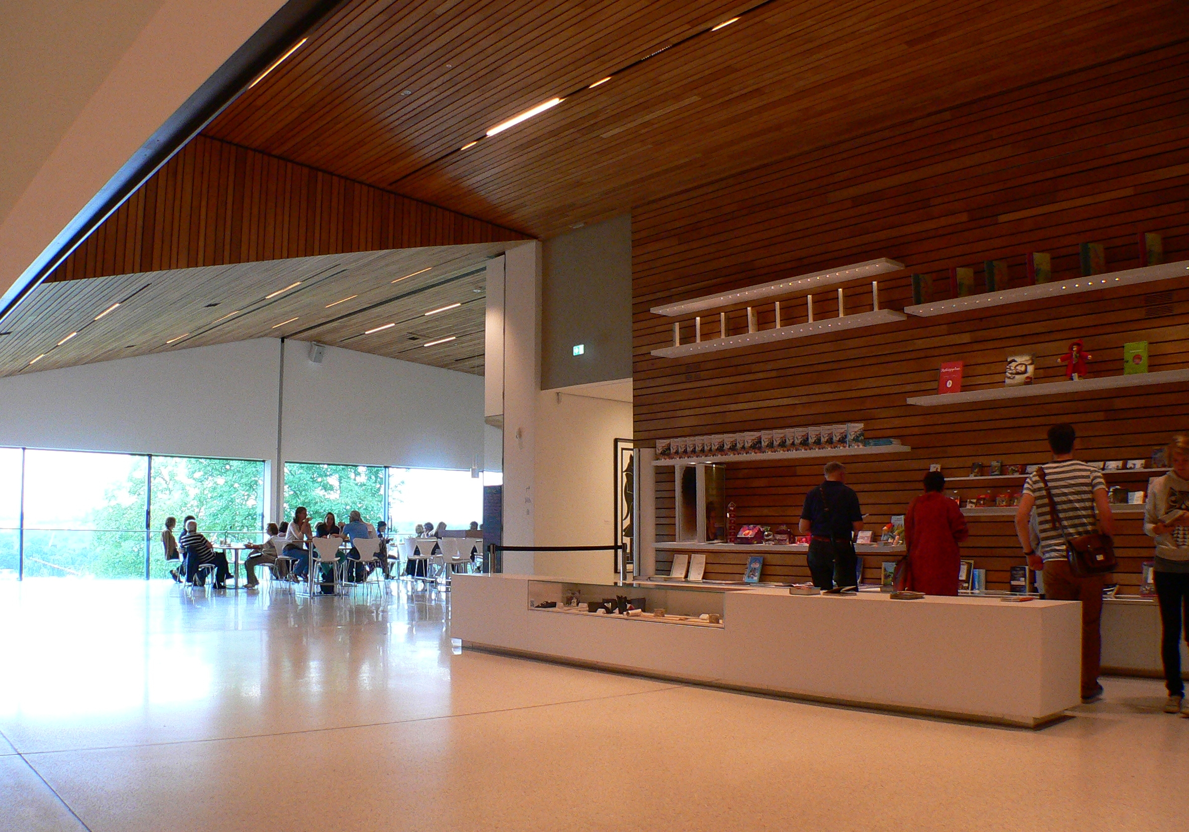 Foyer und Café im Museum GrimmWelt in Kassel, Deutschland